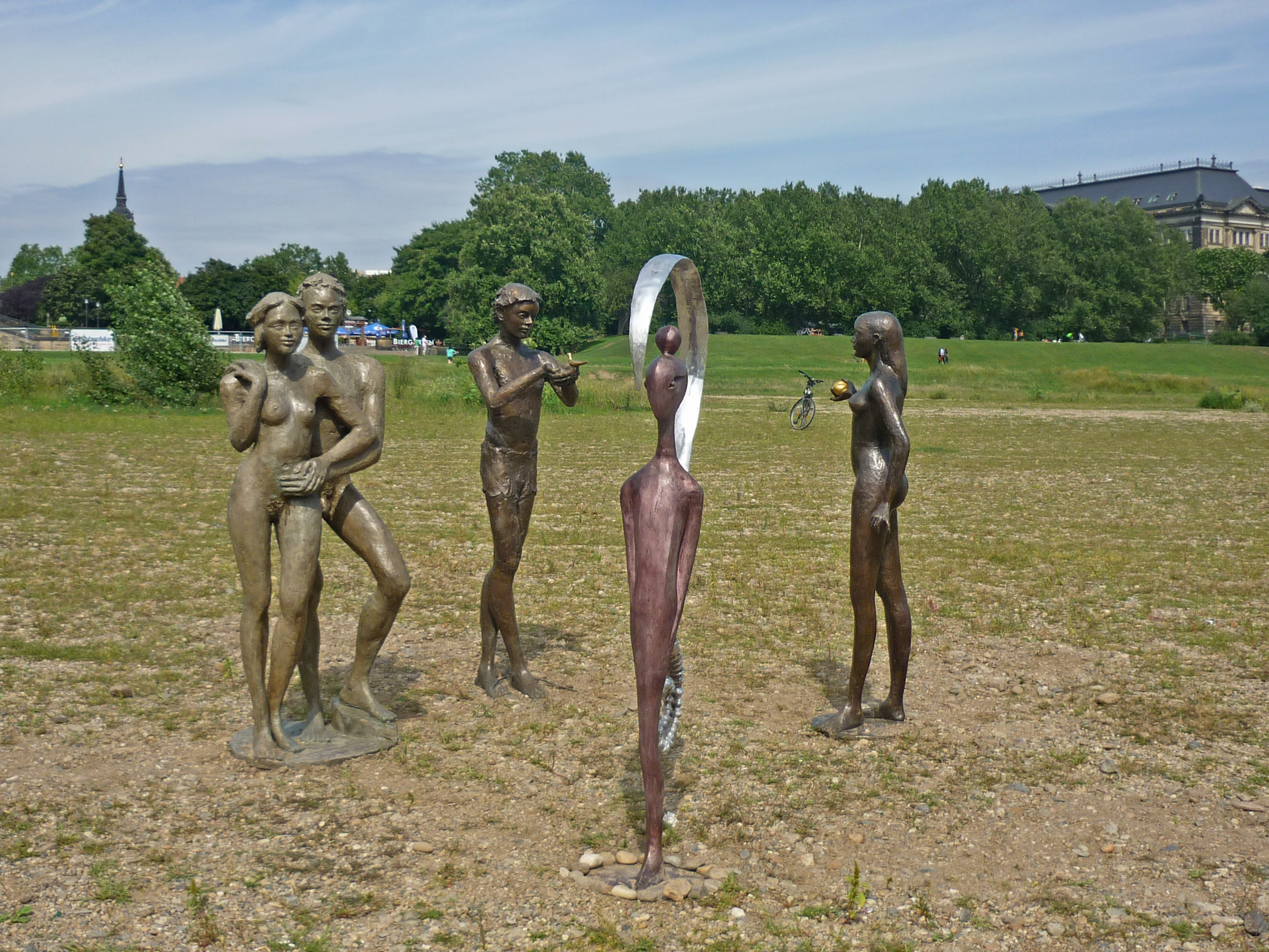 Skulpturengruppe von Thomas Reichstein an der Elbe in Dresden (2017) mit folgenden Figuren Schamane, ein Paar, Flora und Fauna. Material: Aluminiumguss.